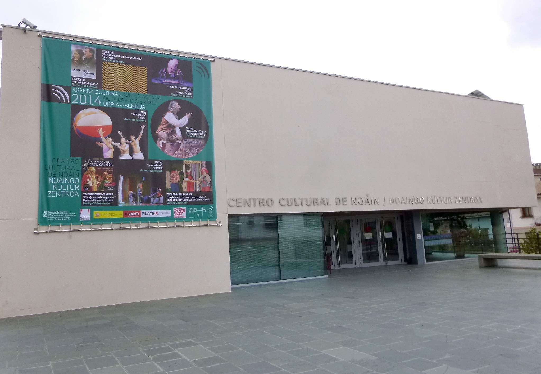 Centro Cultural de Noáin (Navarra).